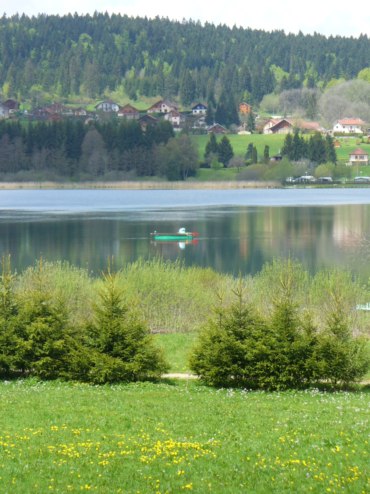 Auteur: Utilisateur:Suaudeau Description: Vue d'un pêcheur prise sur la rive droite du lac de Saint-Point. Au fond la commune de Saint-Point-Lac.